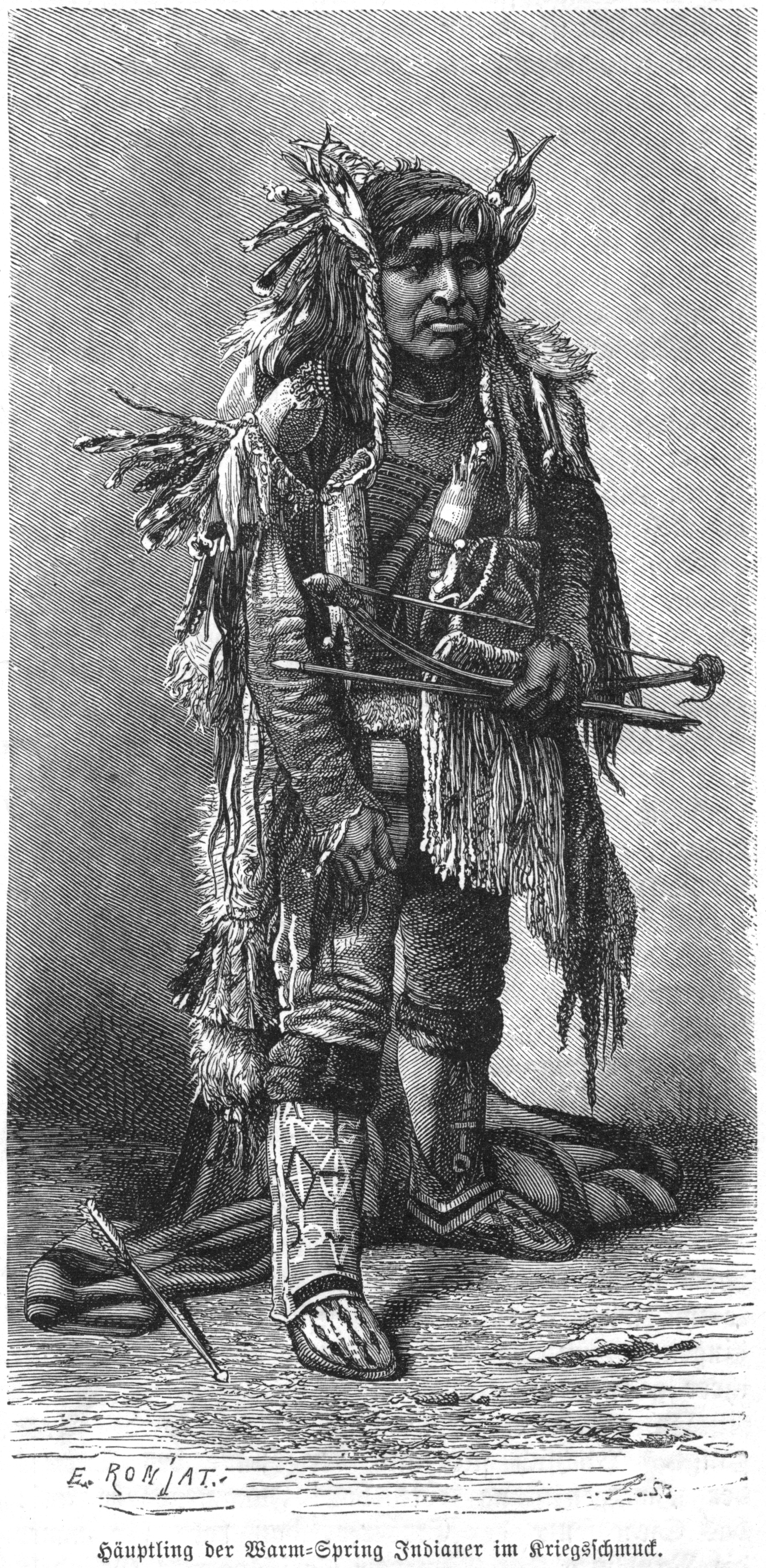 Häuptling der Lower Chinook aus dem Warm Spring Reservat 1886 in Kriegskleidung